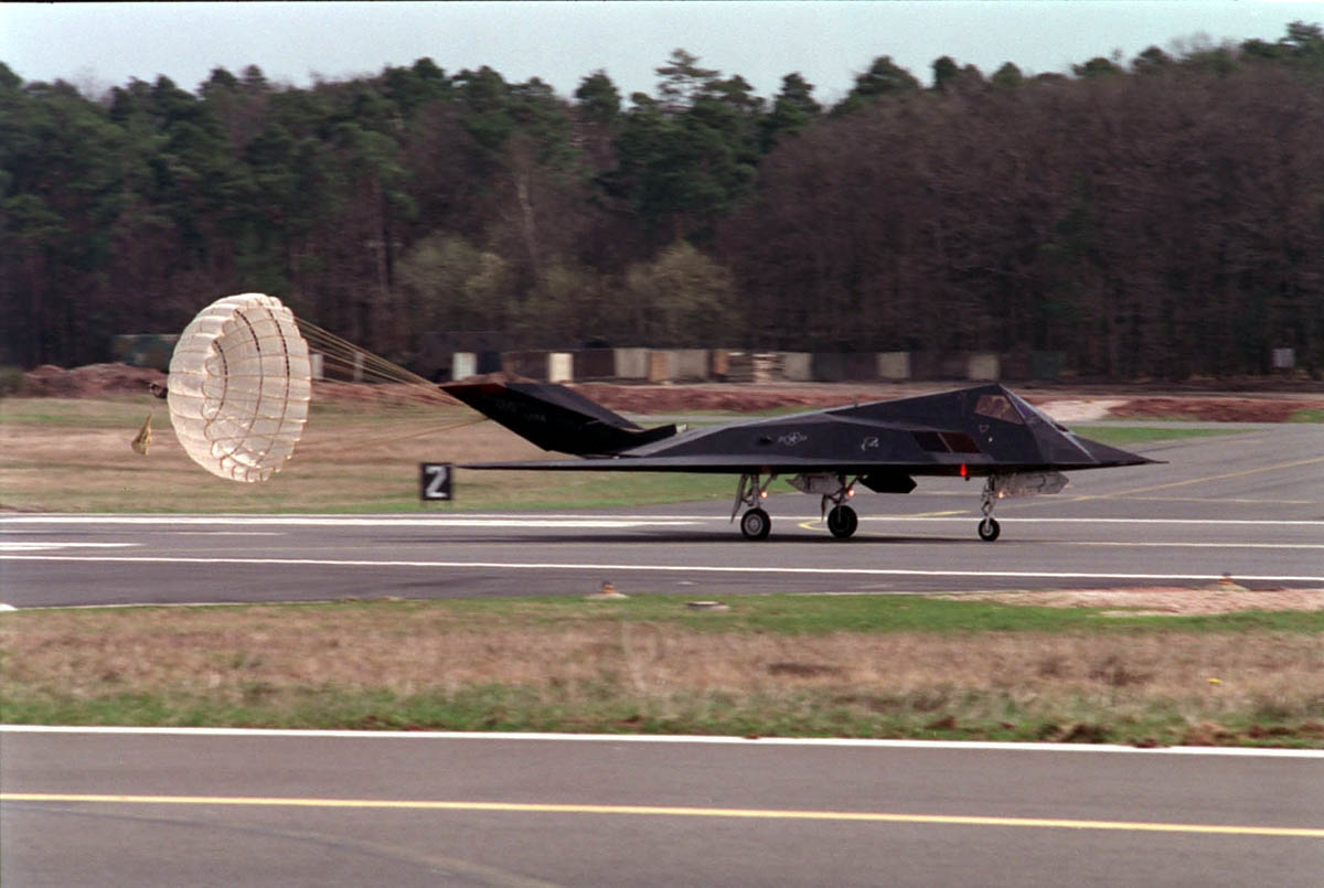 Landung einer F-117 in Spangdahlem Erstellt aus Quelle